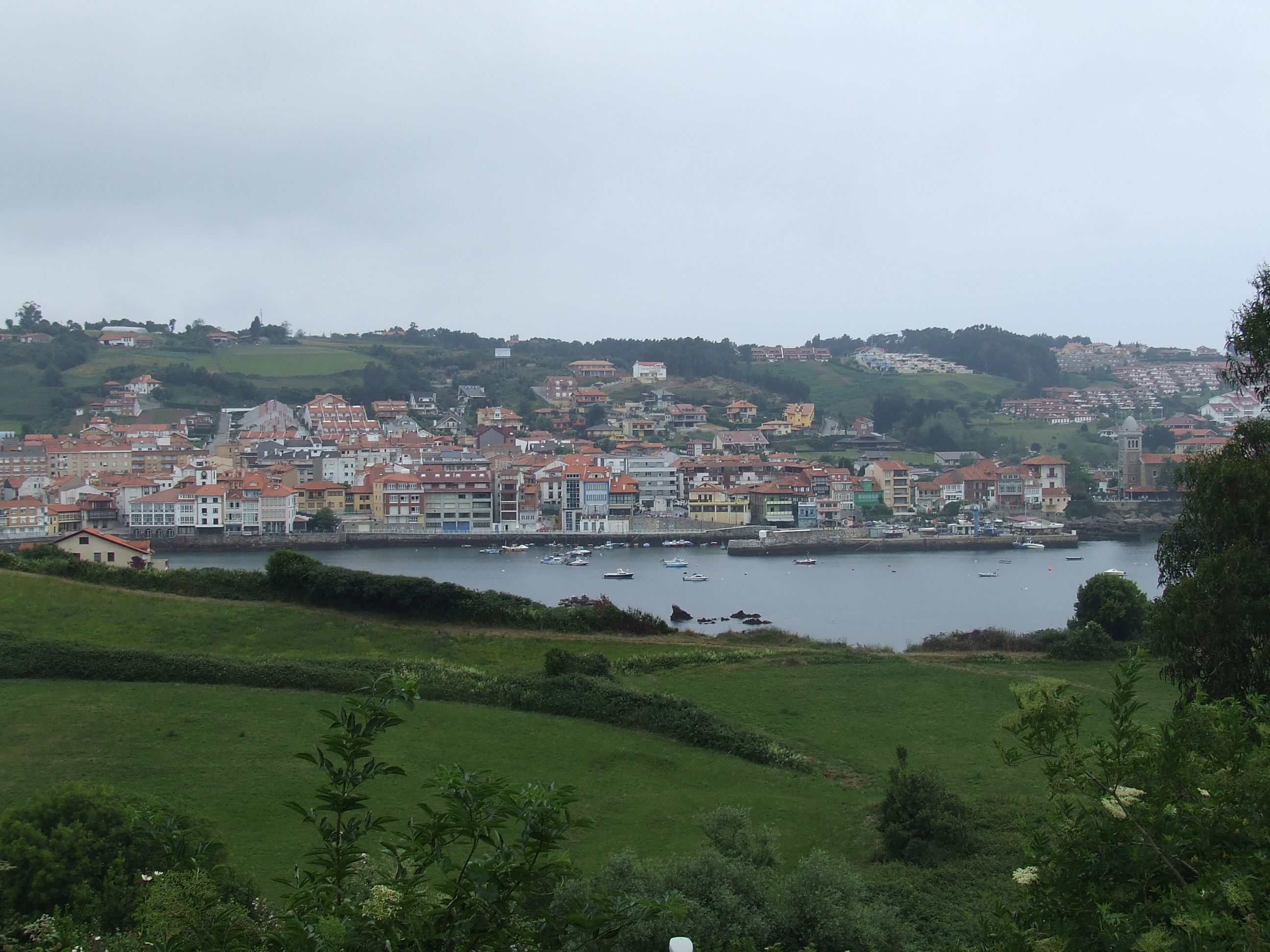 Luanco desde Los Laureles